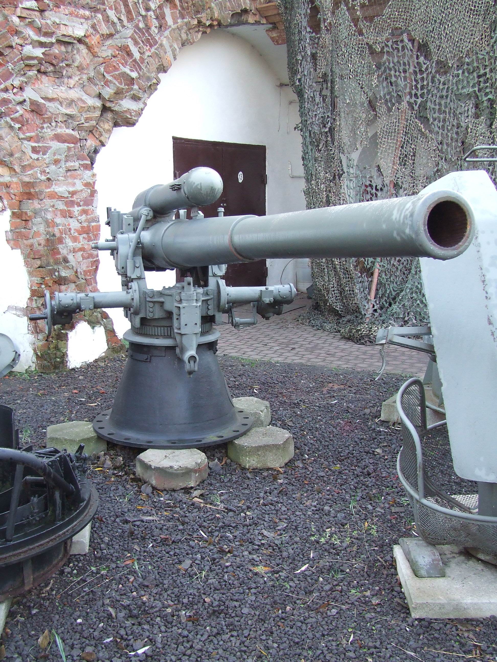 105 mm armata Boforsa vz. 36, ORP Sęp, Muzeum Wojska Polskiego, Warszawa-Czerniaków